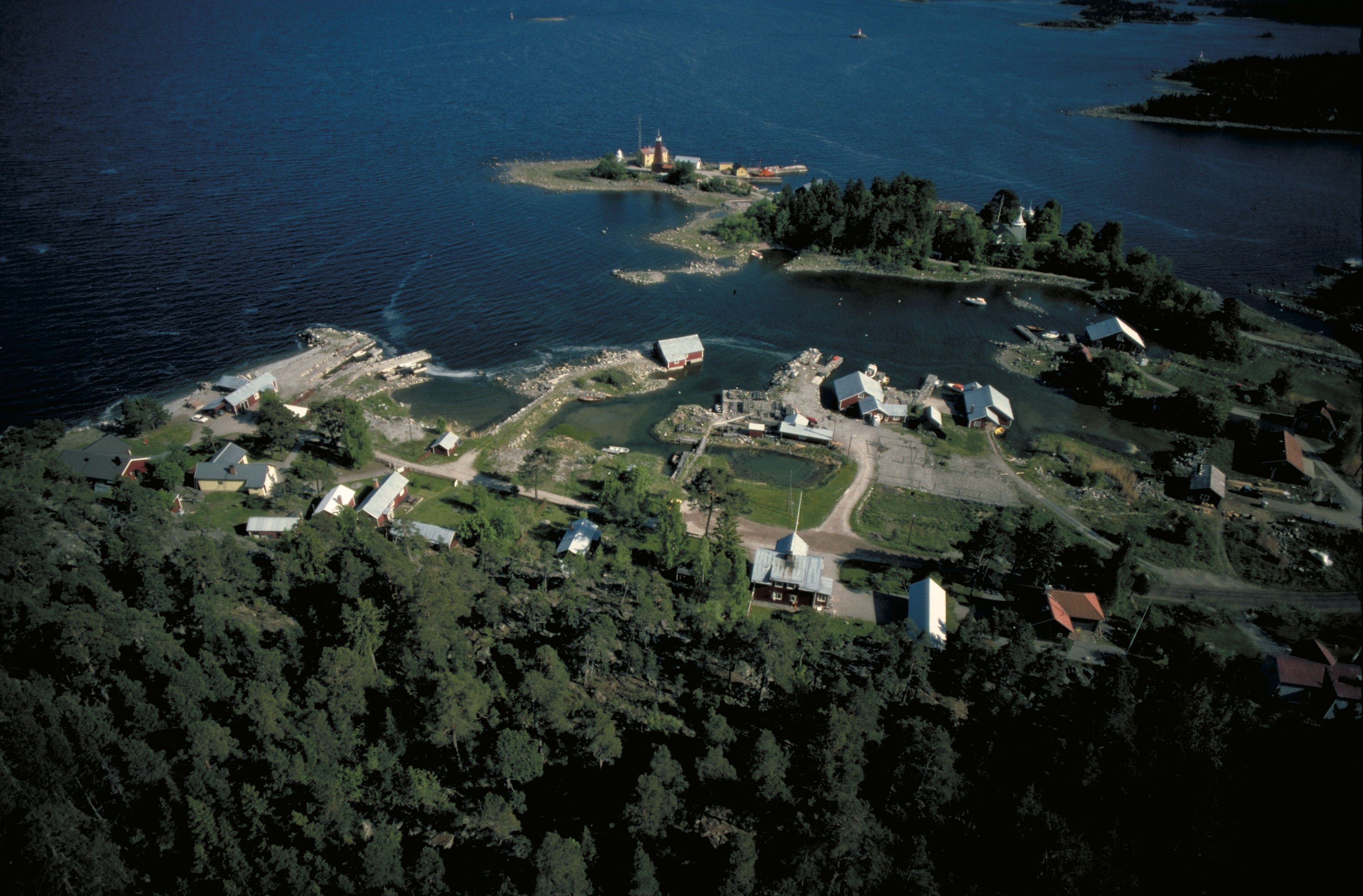 Bilden troligen från början av 1980-talet. Motiv: Bönan Nyckelord: Flygbilder, Riksintressen Kategori: Fiskeläge Bilden troligen från början av 1980-talet.